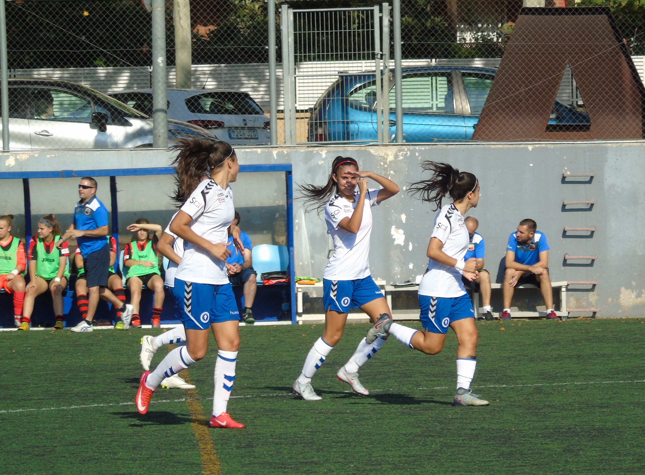 Laura Martinez, futbolista profesional femenina. Foto tomada durante el partido Palleja VS Zaragoza CFF